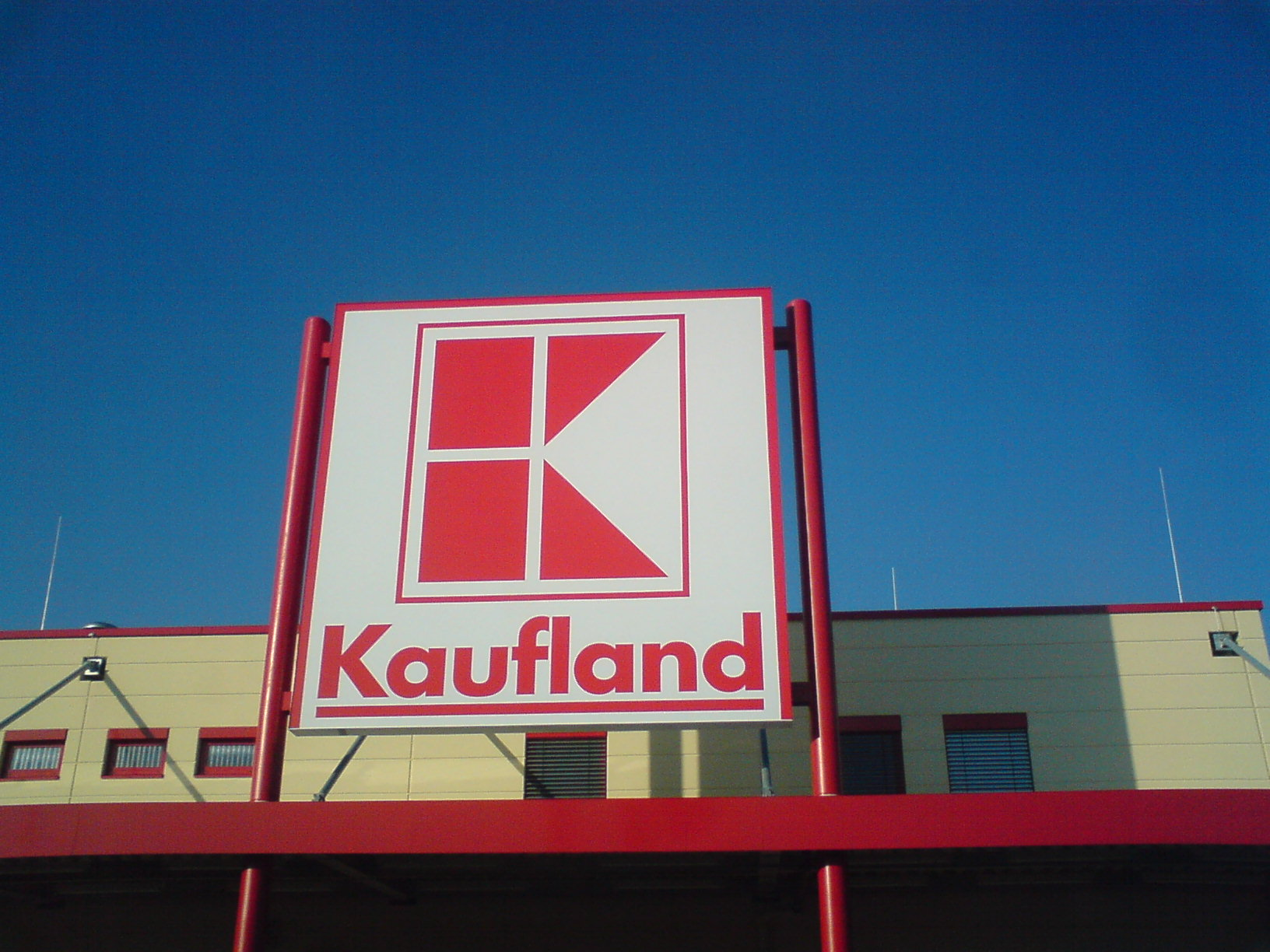 Kaufland in Schifferstadt